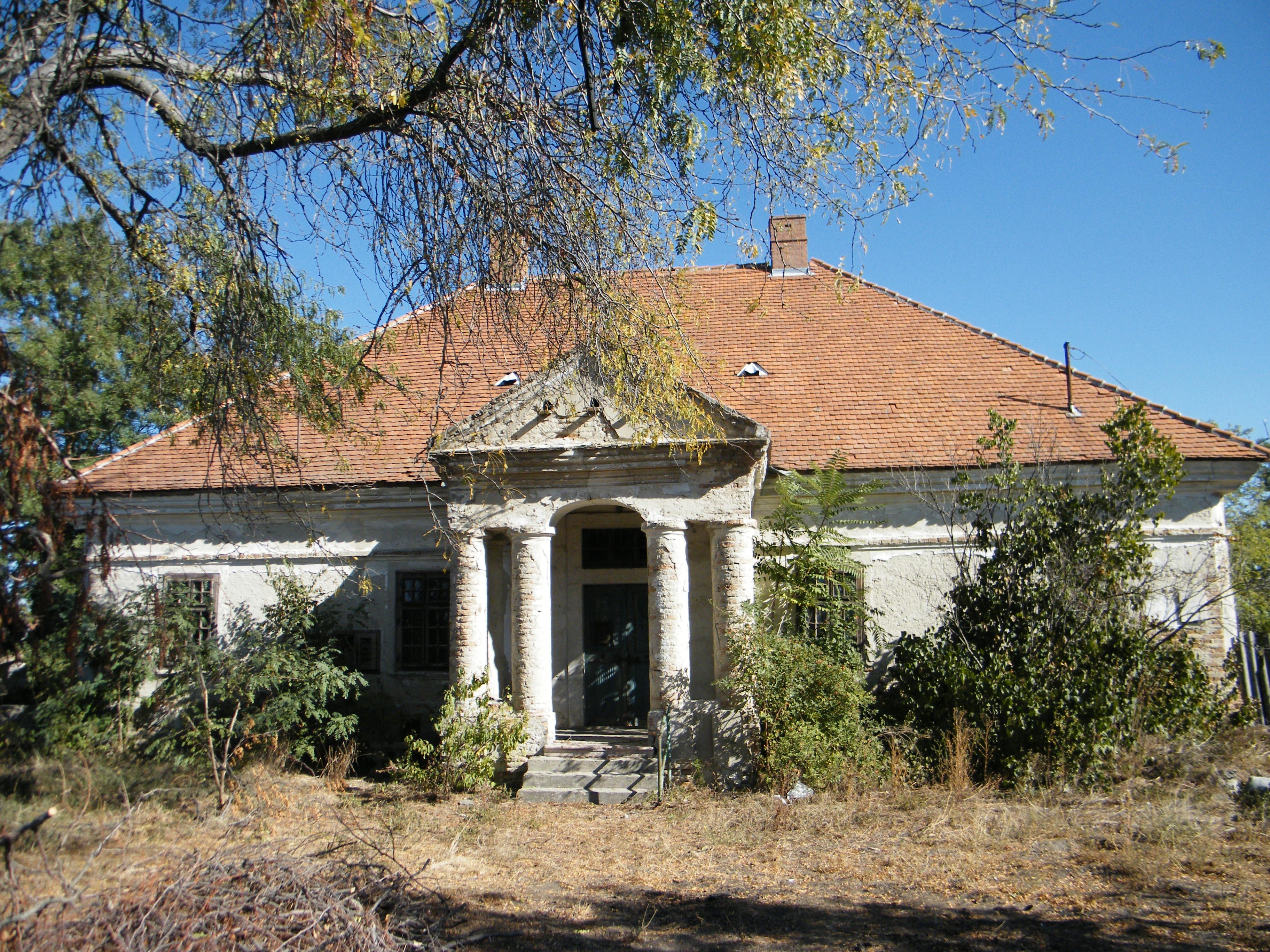 volt Vigyázó-kúria (Abony, Tószegi út 51.) This is a photo of a monument in Hungary, Identifier: 6873